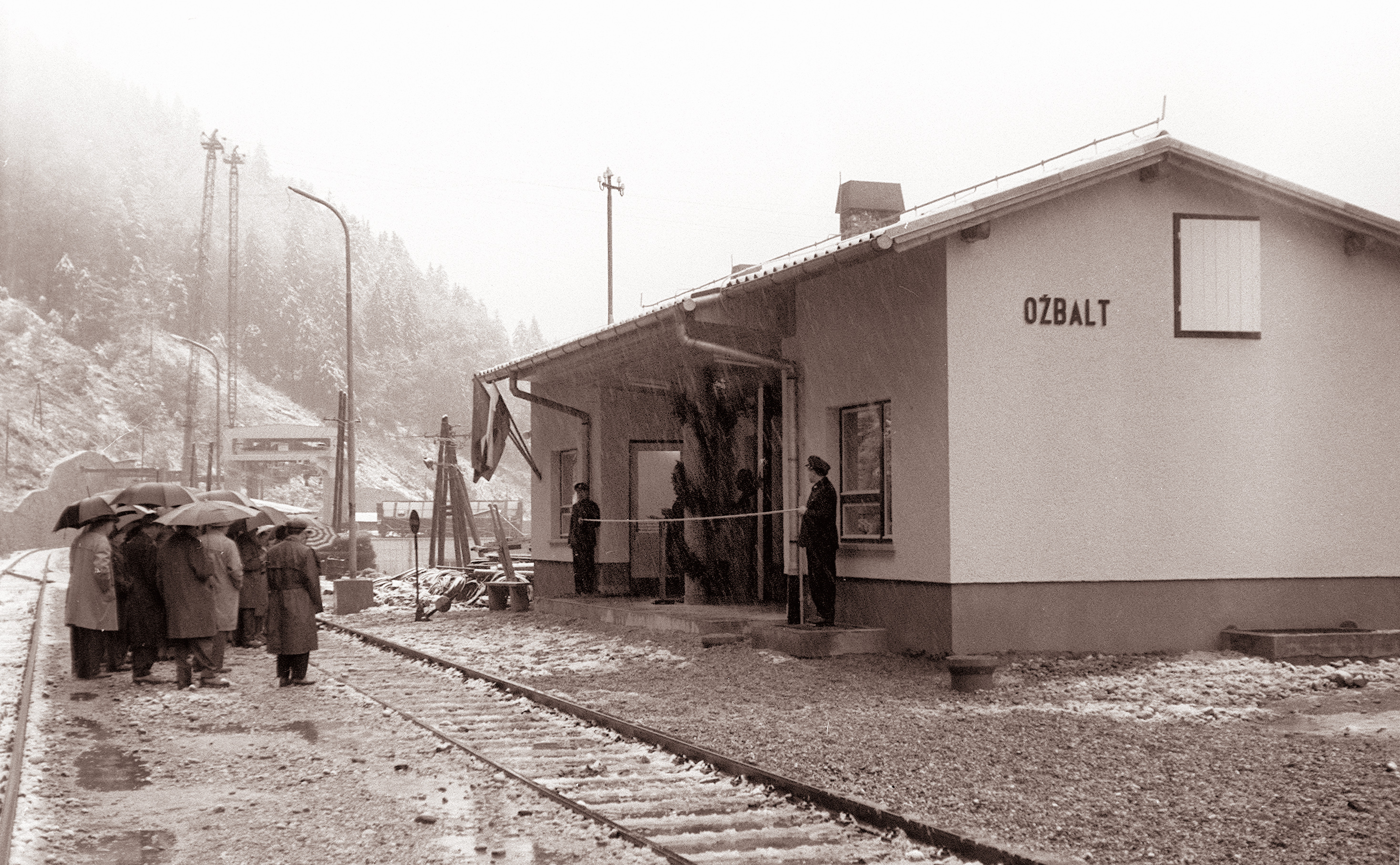 Otvoritev novega železniškega postajališča v Ožbaltu